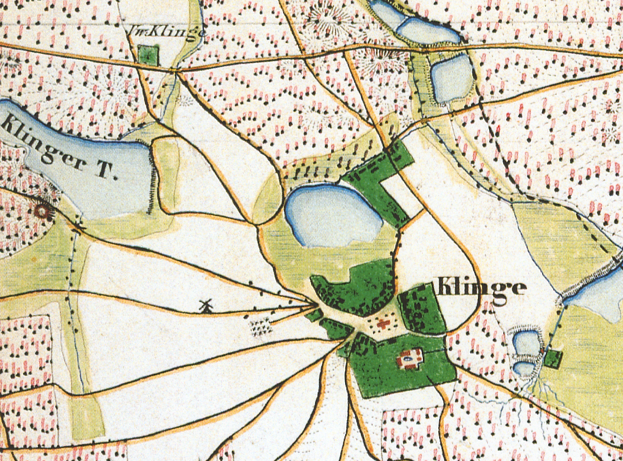 Klinge, Gemeinde Wiesengrund, Landkreis Spree-Neiße, Brandenburg, Ausschnitt aus dem Urmesstischblatt 4253 Forst von 1845